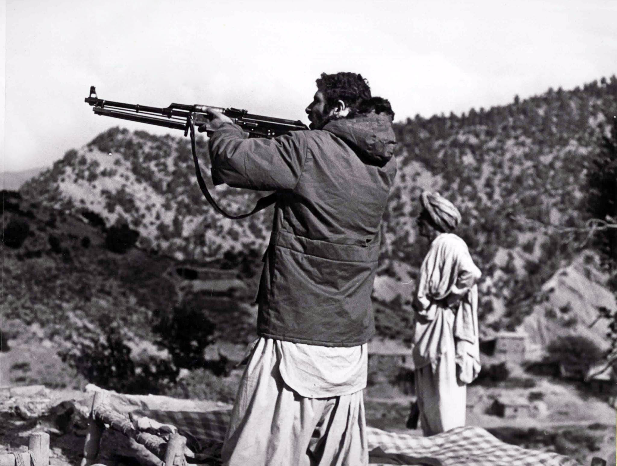 في افغانستان